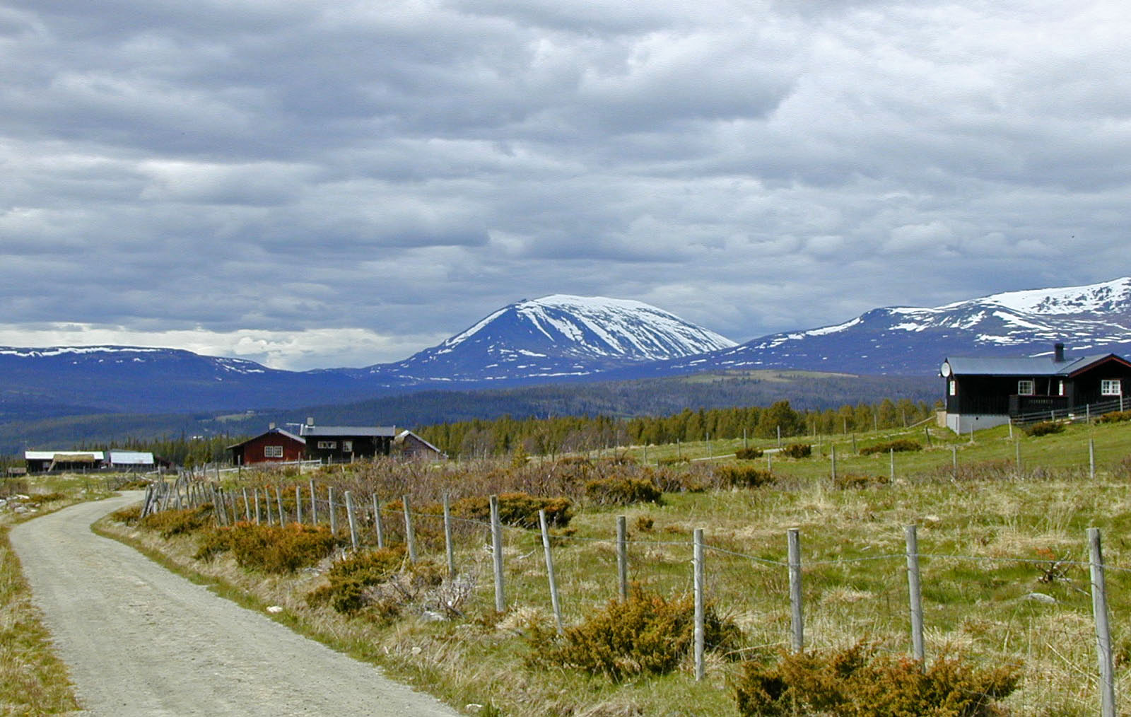 Gålå, Norway